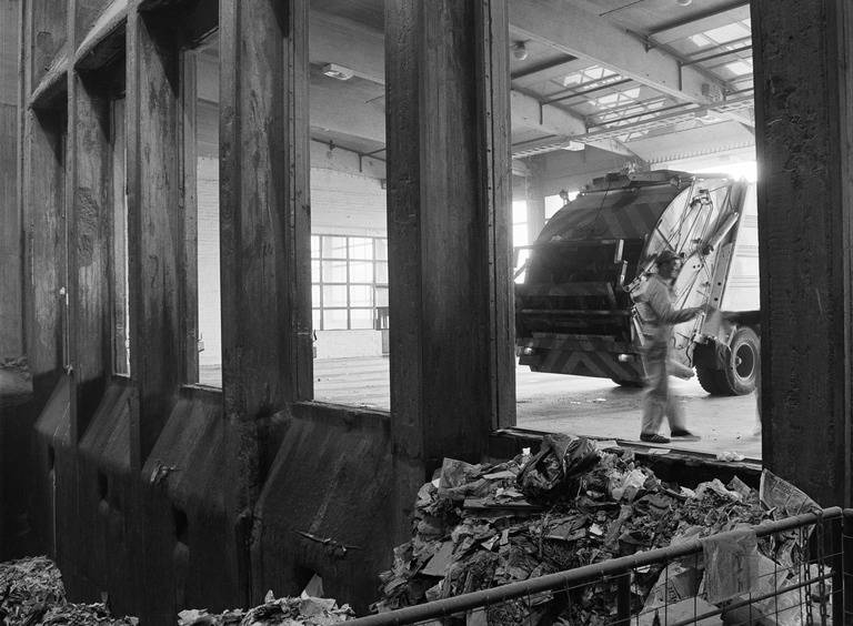 1976 . Kyläsaaren jätteenpolttolaitos, jätekuilu.